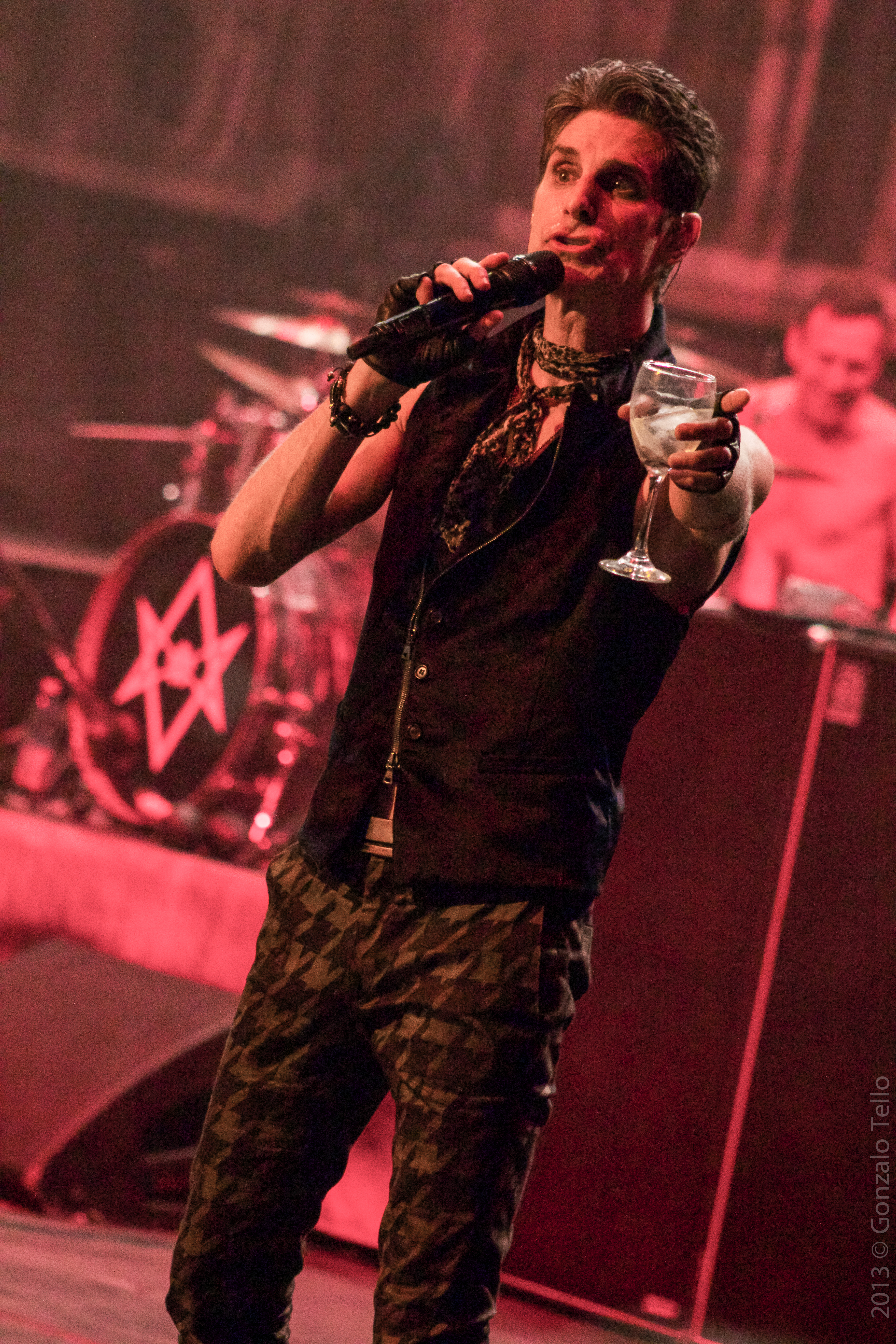 Foto: Gonzalo Tello